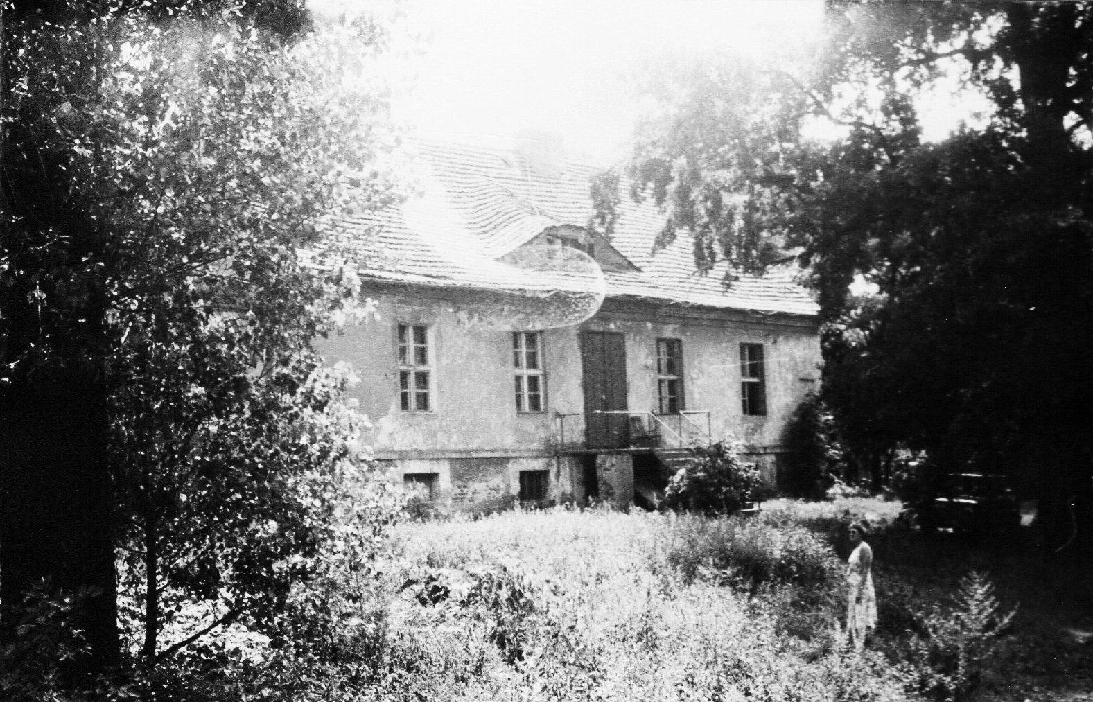 Dwór na Umultowie w Poznaniu w 1989r.